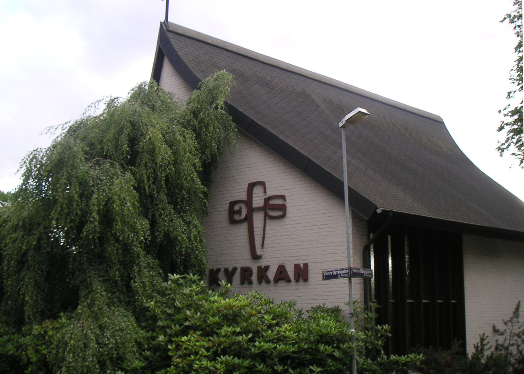 Ingen hydda, dock kyrkan i Alingsås.